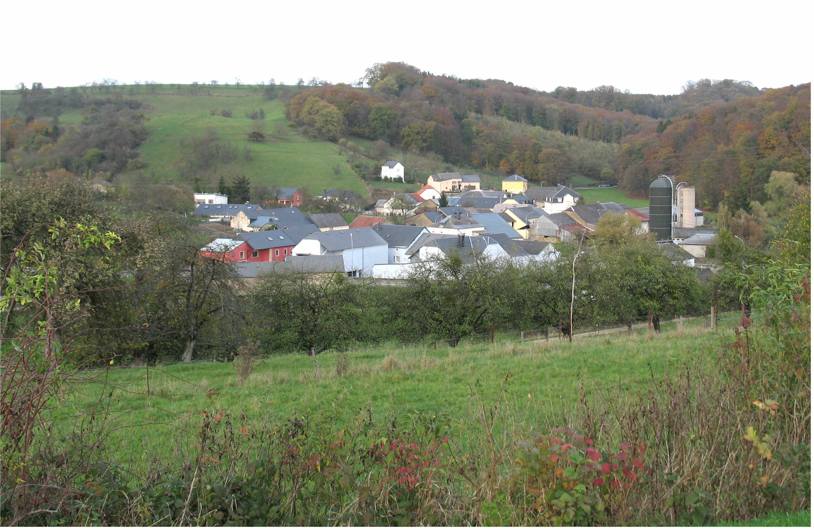 Vue op Ierseng Ierseng Ierseng